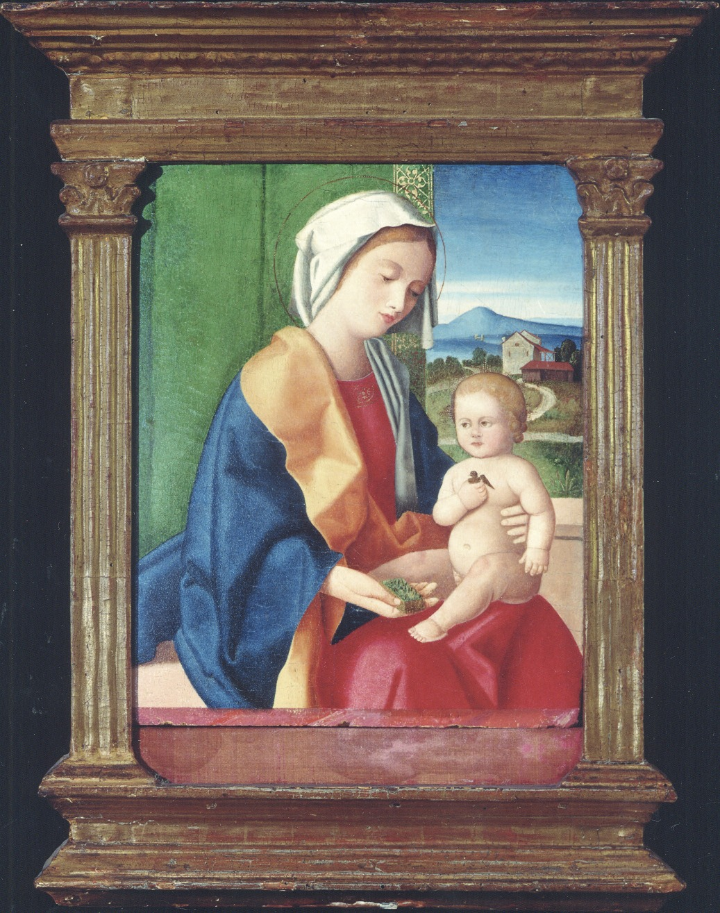 Marco Bello - Madonna con Bambino - inizi del XVI secolo - Collezione privata